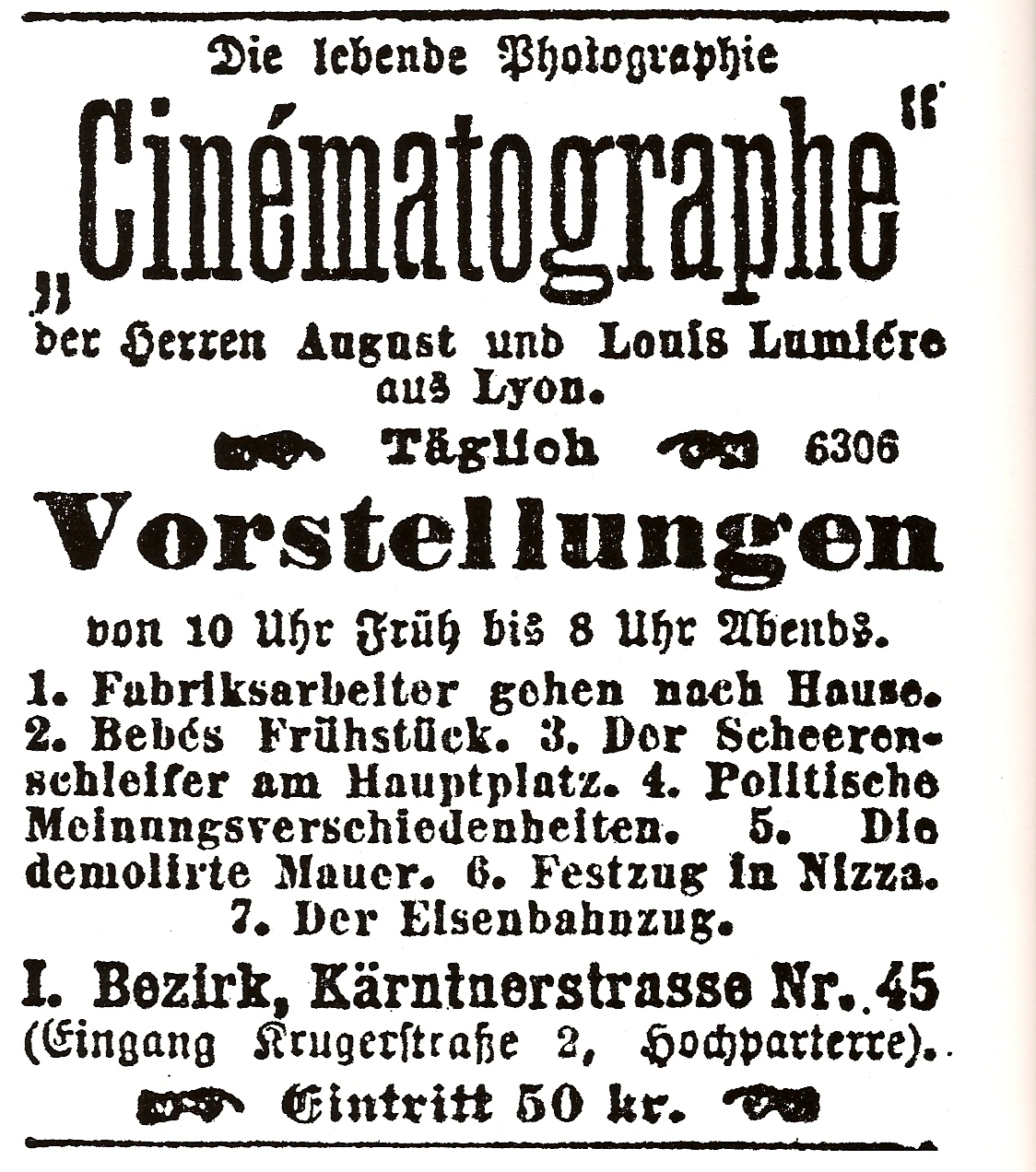 Programmankündigung April 1896 im "Illustrierten Wiener Extrablatt" für die Filmvorstellungen im Vorführraum von Eugène Dupont im Ersten Bezirk Wiens